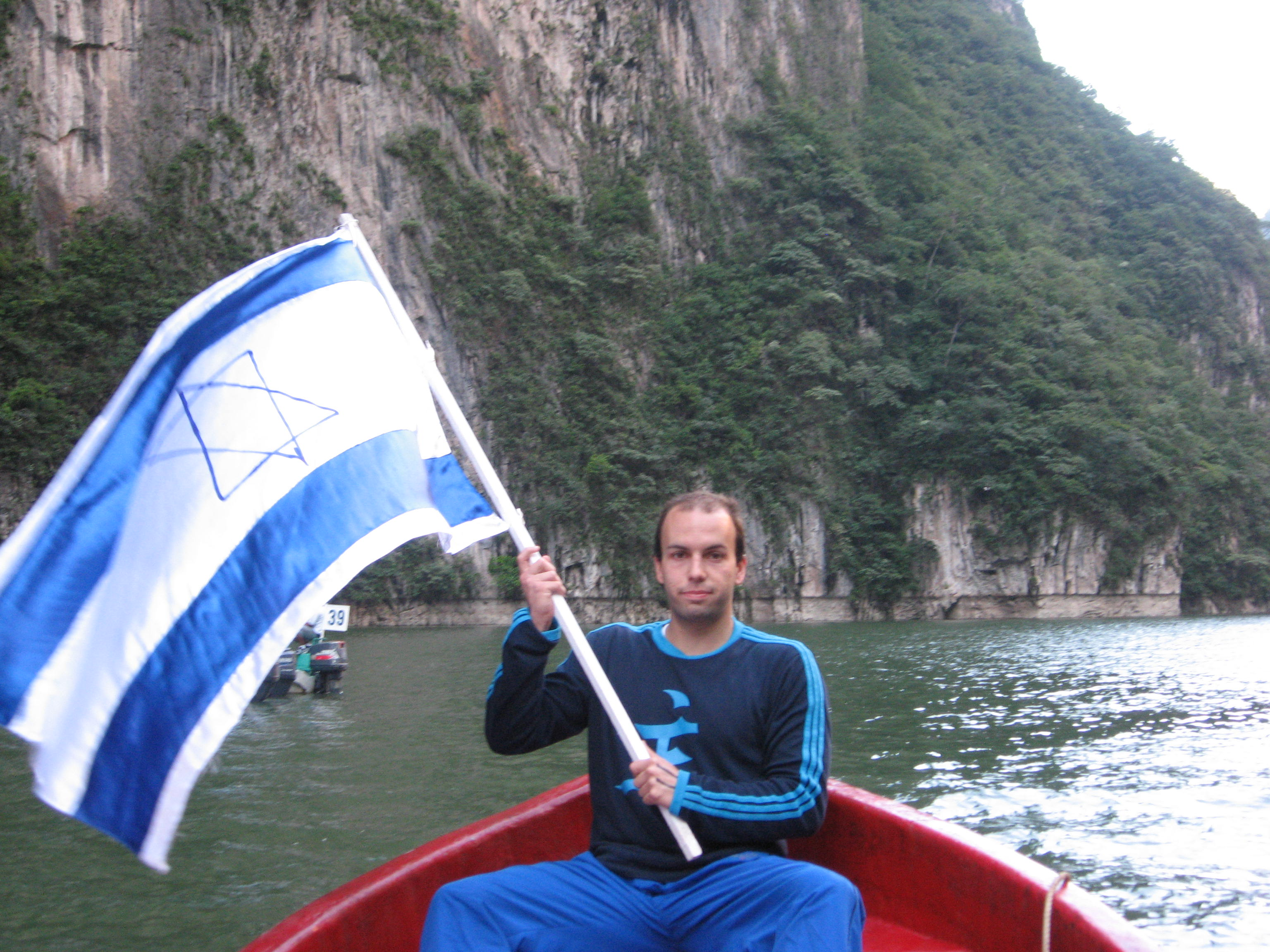 דניאל קציר